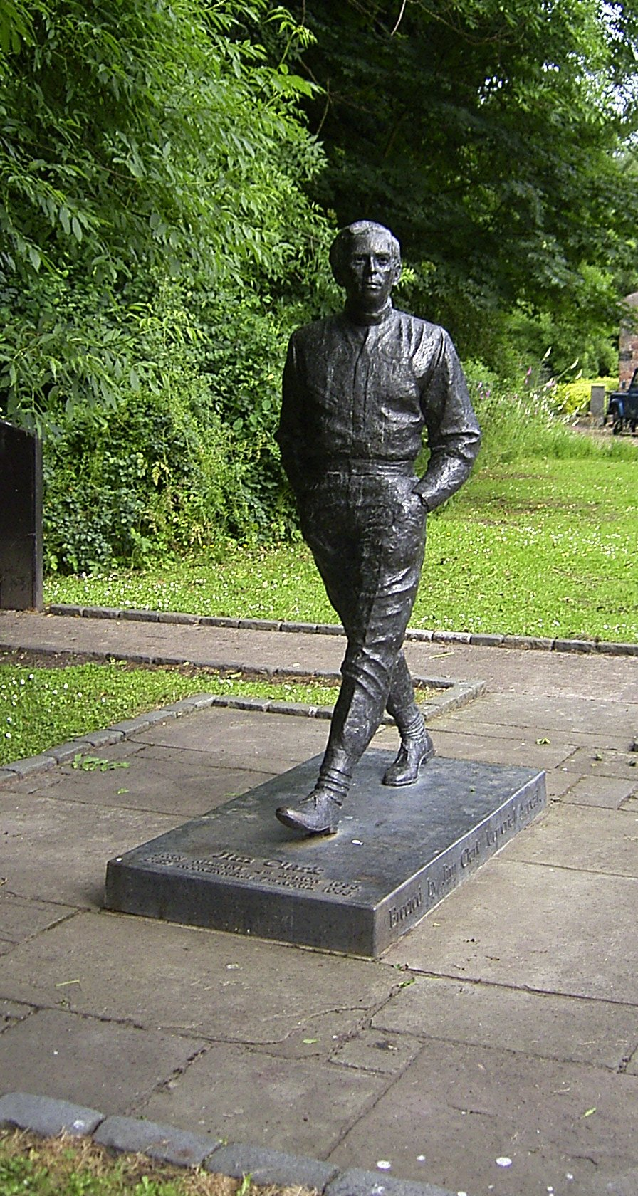 Jim Clark memorial Sculpture